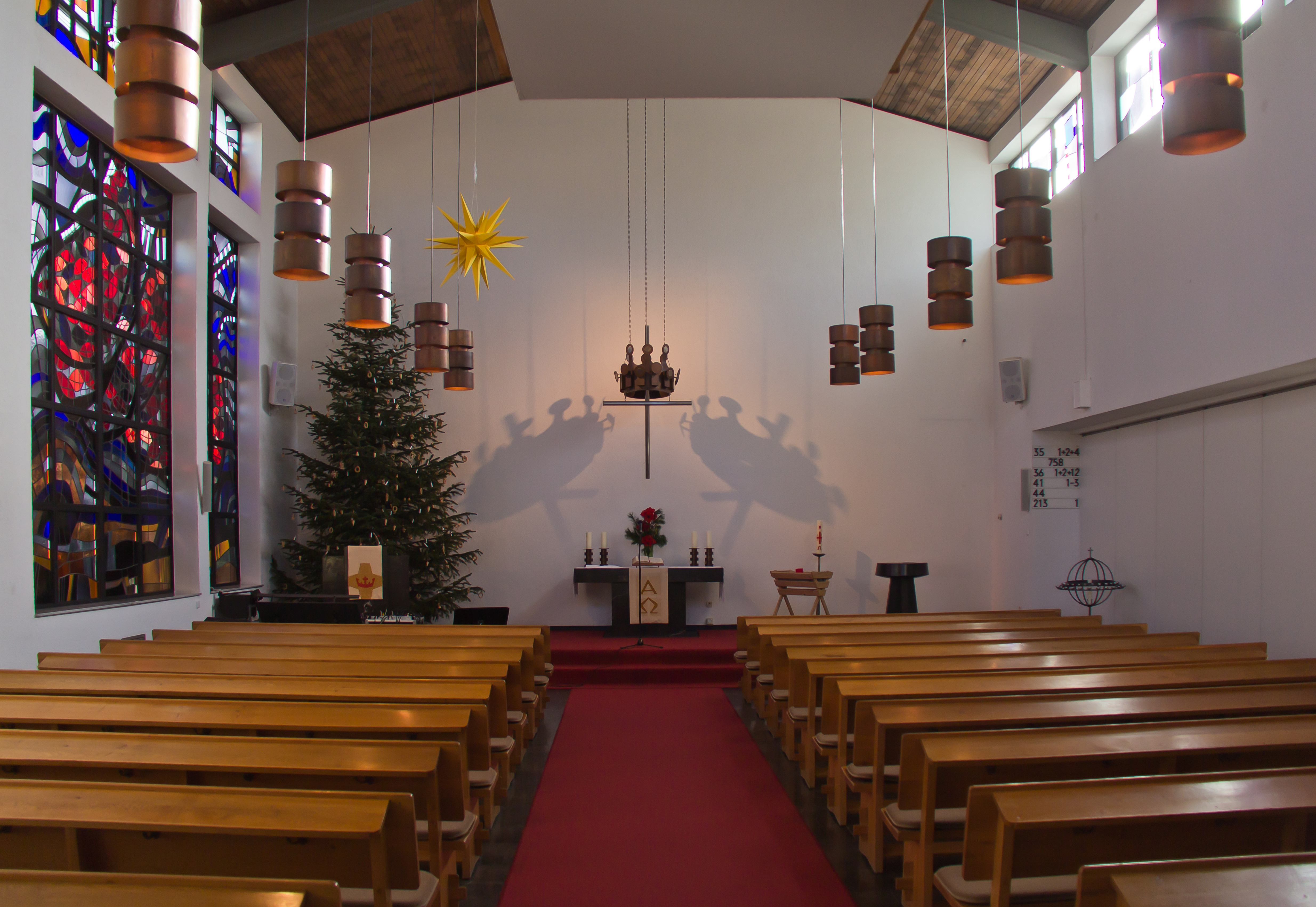 Evangelische Petrikirche, Quadrath-Ichendorf, Bergheim